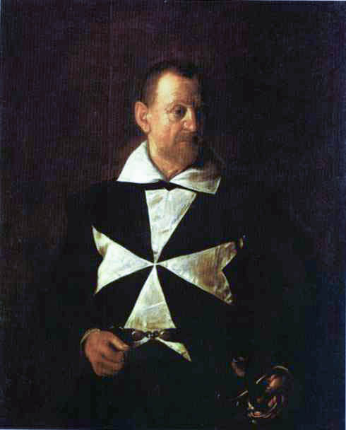 Antonio Martelli (1534-1618) è stato un condottiero italiano, esponente della famiglia fiorentina dei Martelli e cavaliere di Malta dal 1558.